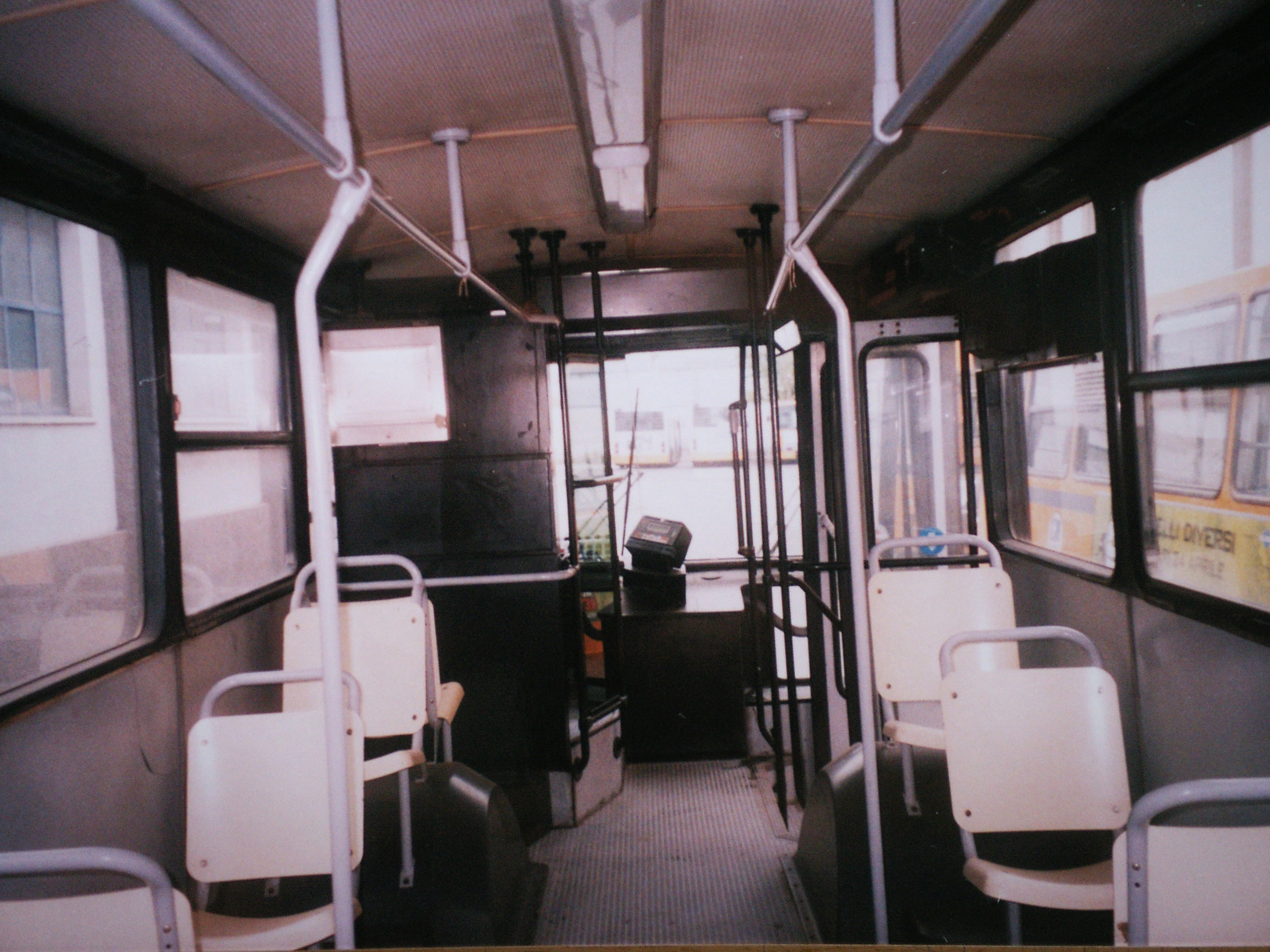 Interno del Filobus F140 606